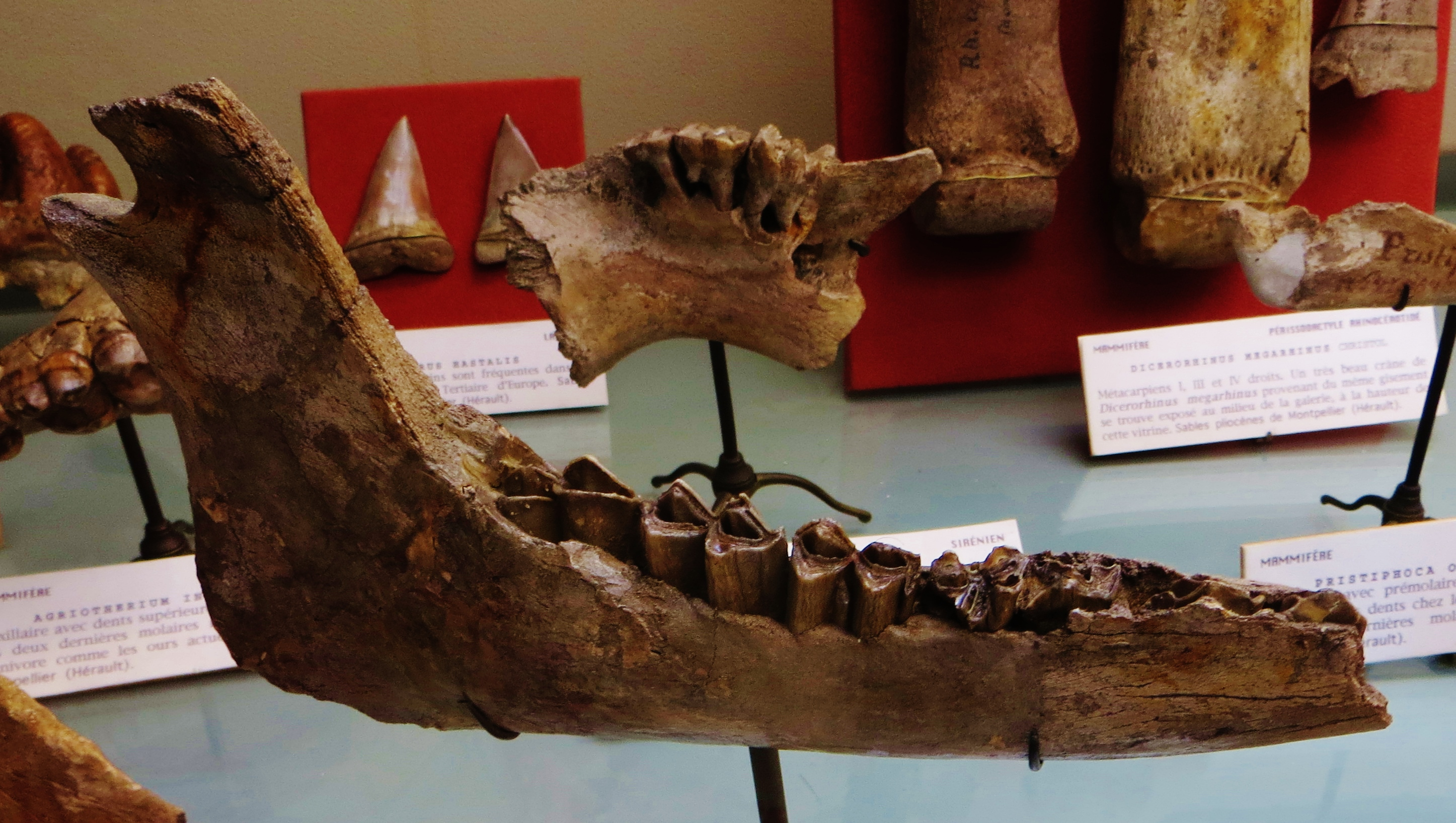 Fossil of Parabos, an extinct mammal - Took the photo at Musee d'Histoire Naturelle, Paris